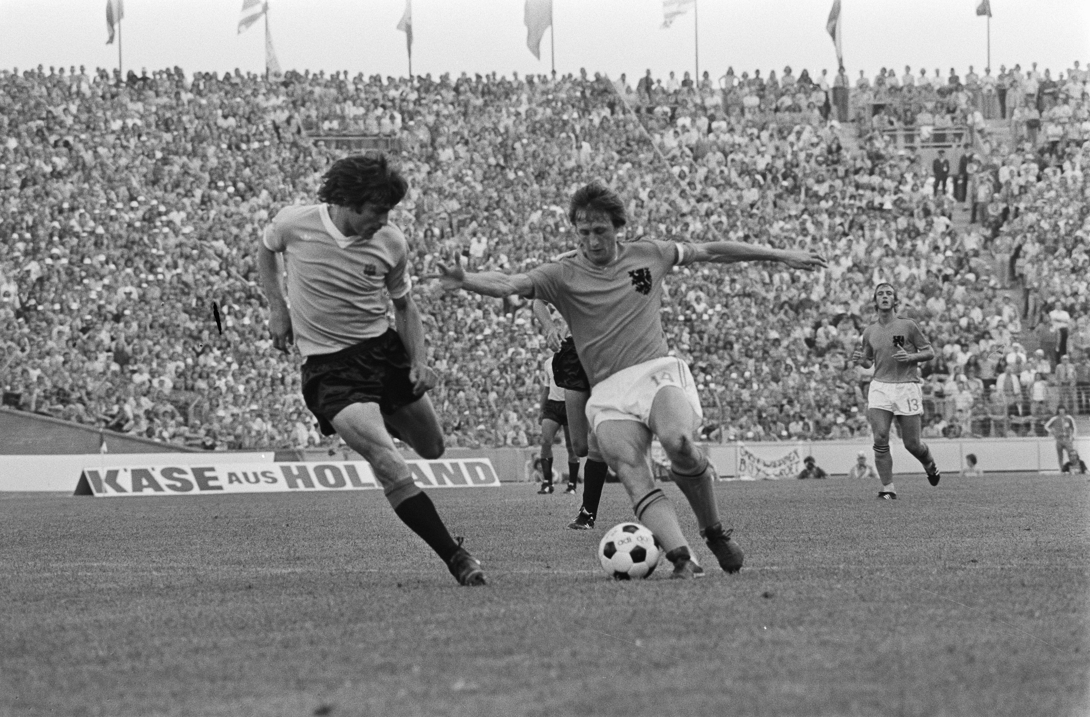 Collectie / Archief : Fotocollectie Anefo Reportage / Serie : [ onbekend ] Beschrijving : Wereldkampioenschap voetbal 1974; Nederland tegen Uruguay 2-0; Cruijff in actie Datum : 15 juni 1974 Trefwoorden : sport, voetbal, wereldkampioenschappen Persoonsnaam : Cruijff, Johan Fotograaf : Verhoeff, Bert / Anefo Auteursrechthebbende : Nationaal Archief Materiaalsoort : Negatief (zwart/wit) Nummer archiefinventaris : bekijk toegang 2.24.01.05 Bestanddeelnummer : 927-2584